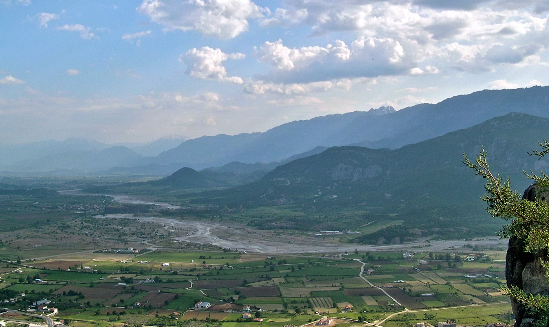 η κοιλάδα του Πηνειού